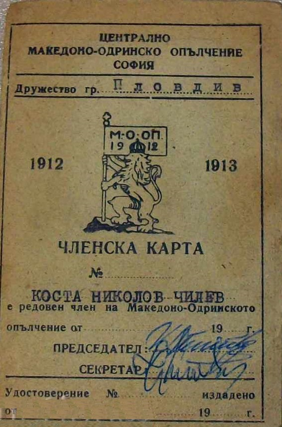 Членска карта на пловдивското дружество на Съюза на македоно-одринските опълченски дружества на Коста Николов Чилов.